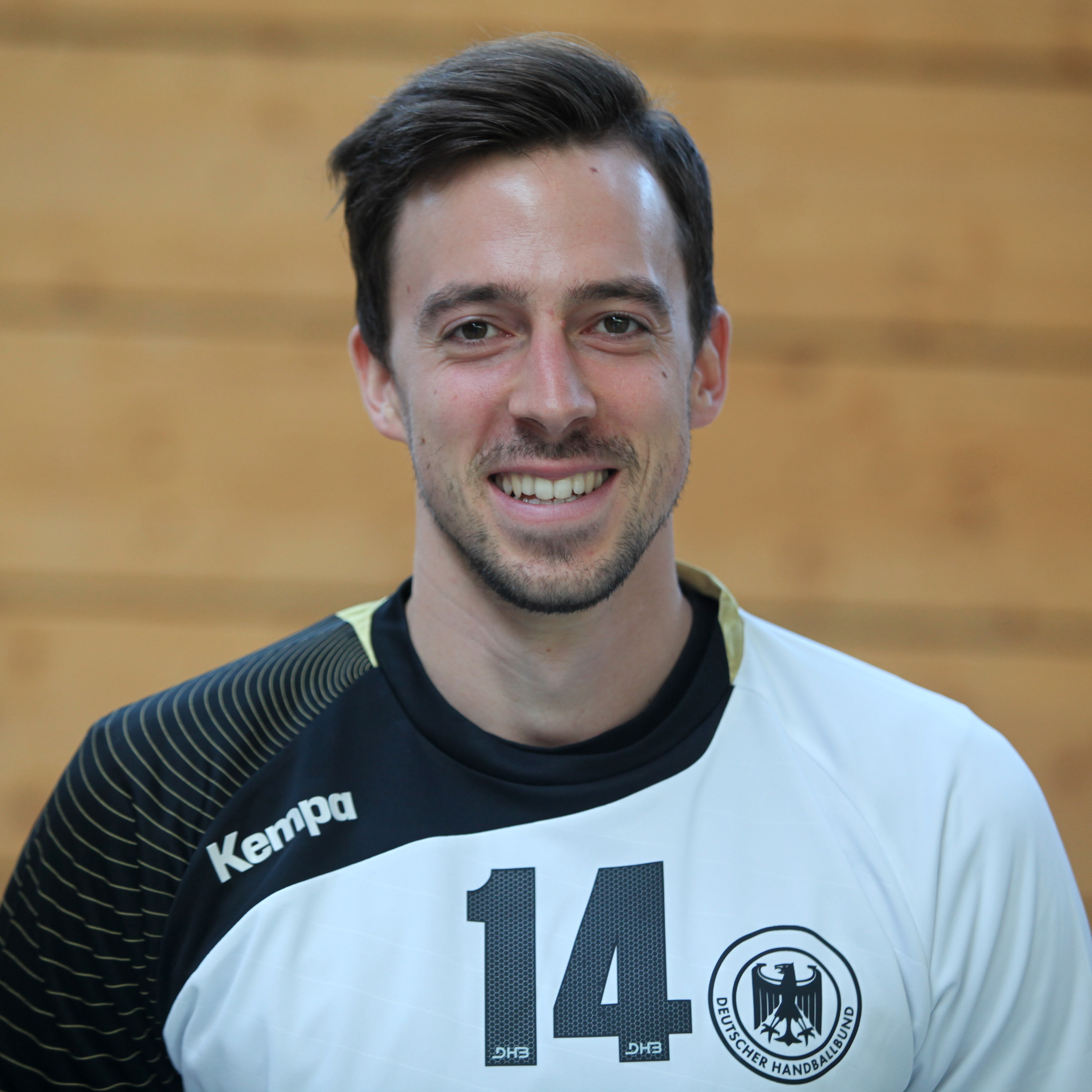 Patrick Groetzki, im Trikot der Deutschen Handball-Nationalmannschaft am 16. September 2014, in Heilbronn.